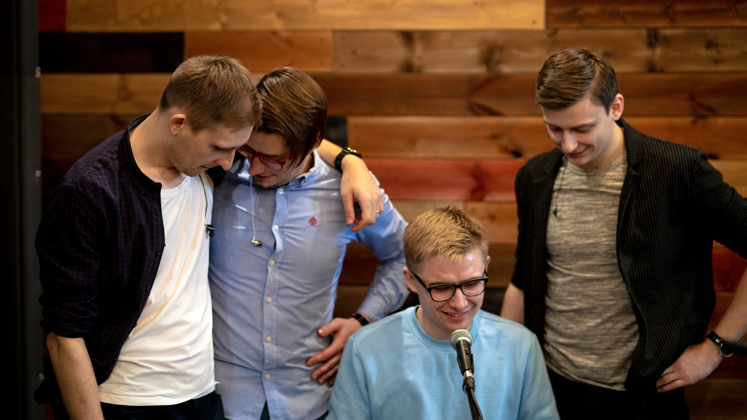 Беларуская (тарашкевіца): Удзельнікі Martin S. (зьлева-направа: Уладзімер Боська, Андрэй Марчанка, Гера Супакоў, Ільля Басько) у студыі падчас здымак лайв-кліпу на сынгл "Новы дзень" (люты 2019).